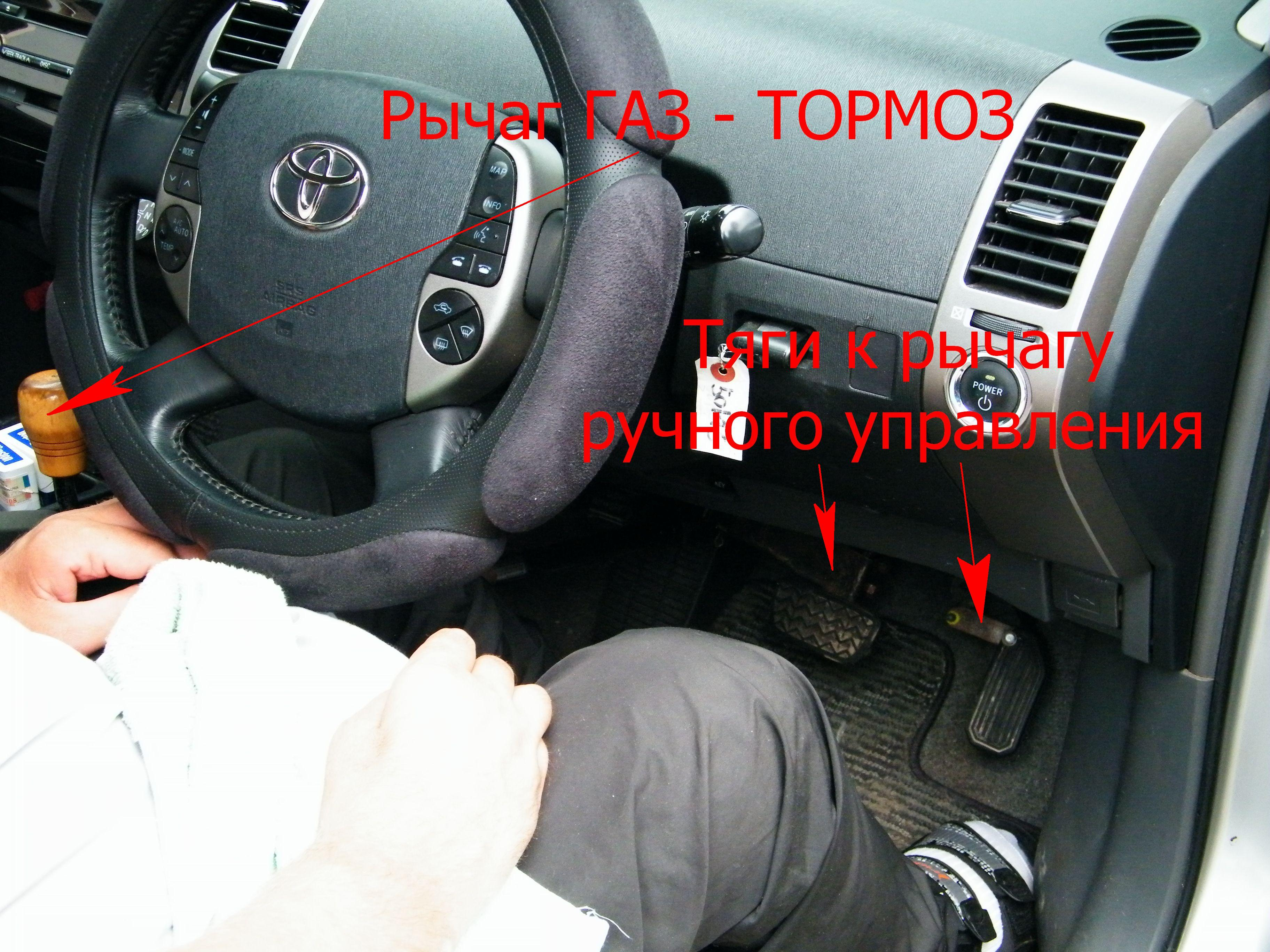 Тойота Приус переделана на ручное управление инвалидом